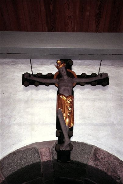 Mellerup Kirke i Danmark. Korbuekrucifiks